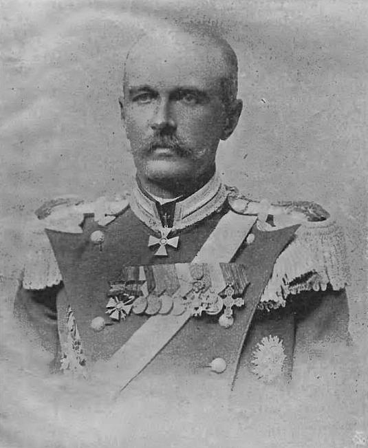 Jerzy Antonowicz Skałon (-1905)